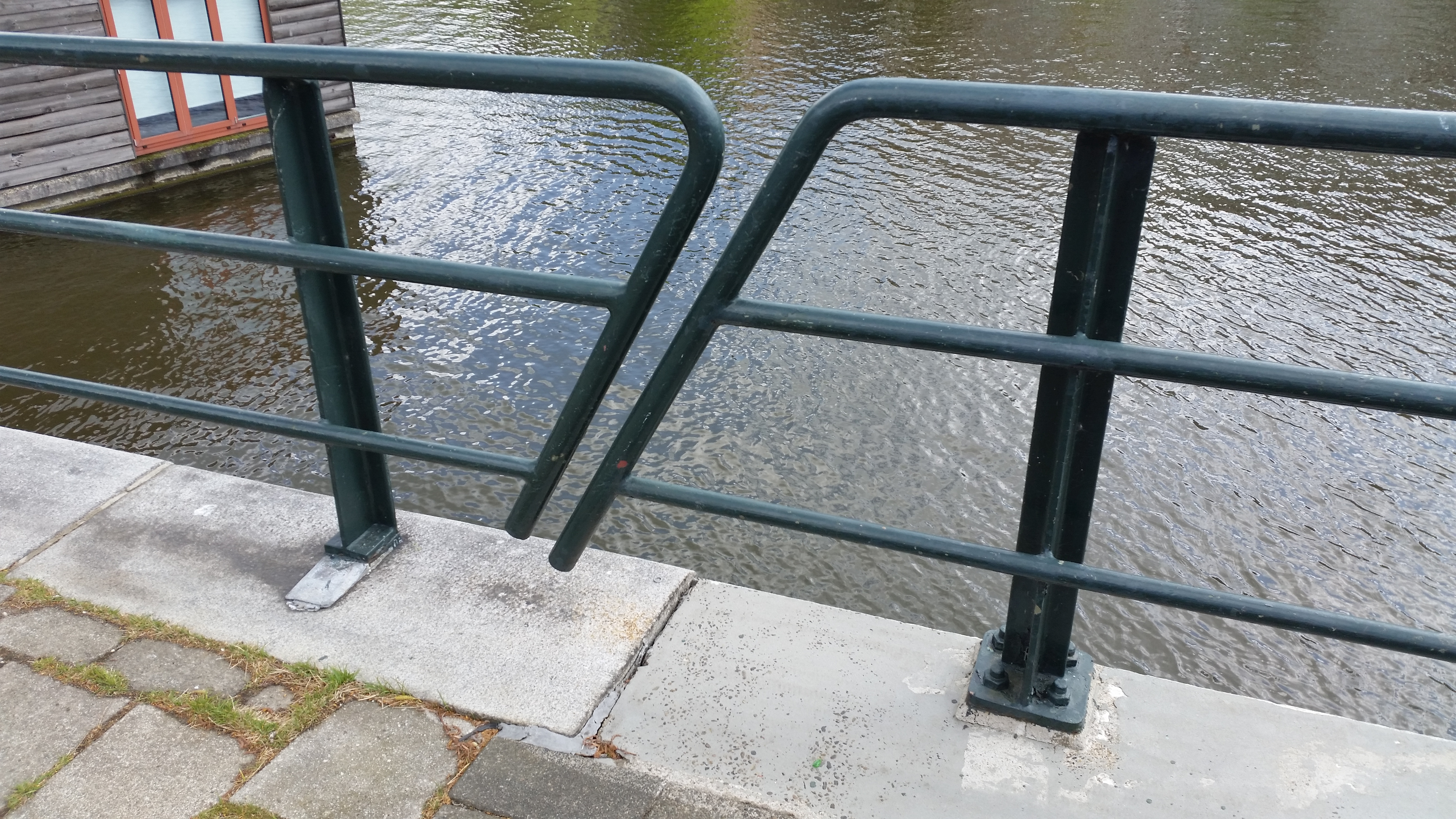 Impressie brug 78 in het Zeeburgerpad/Funenkade, Amsterdam-Centrum